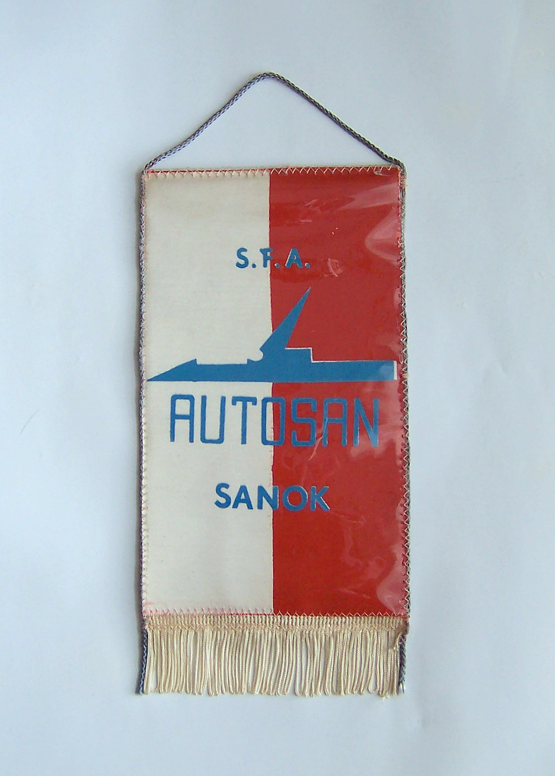 Proporczyk ZKS Stal Sanok.